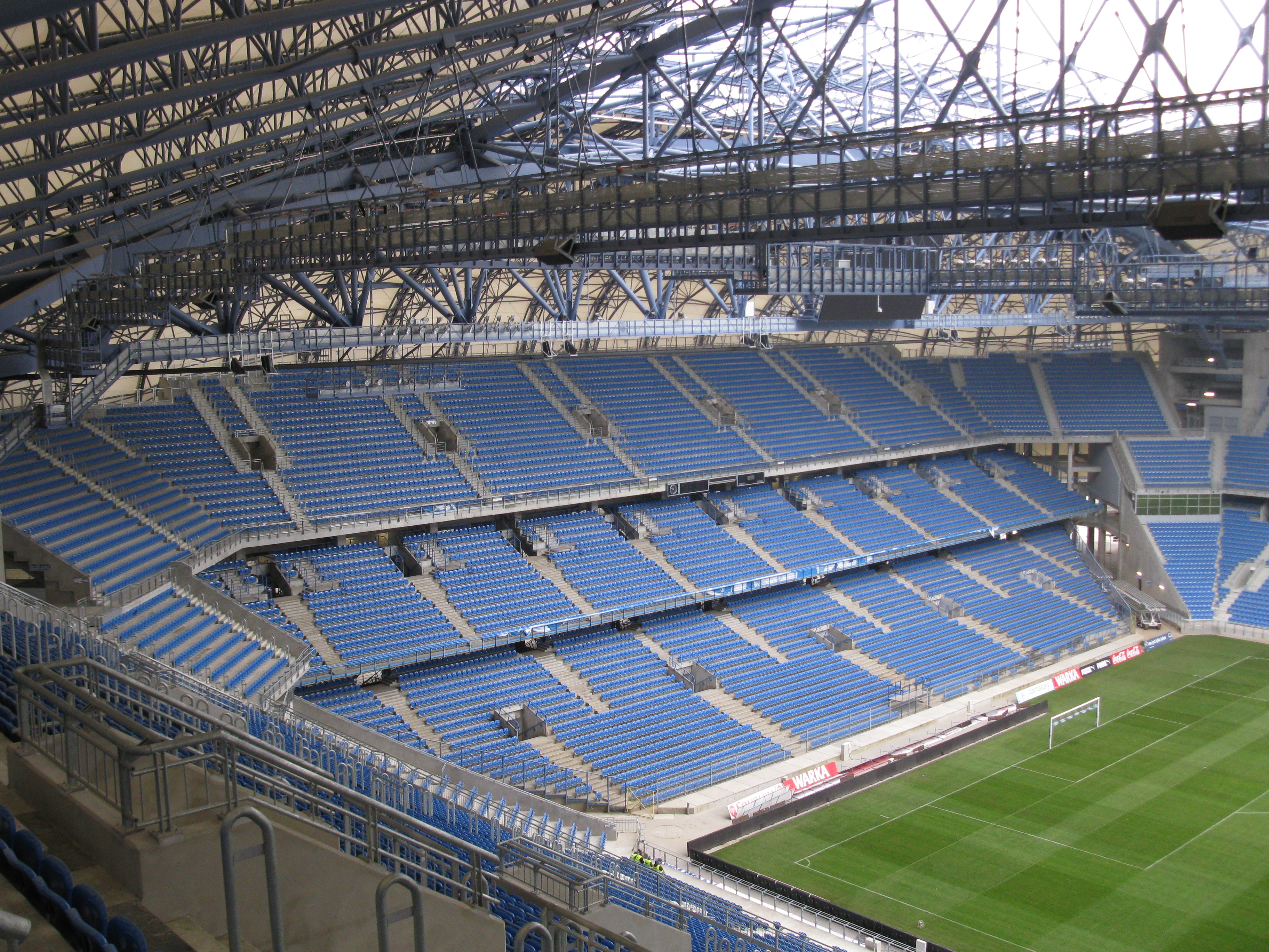 Stadion Lecha Poznan